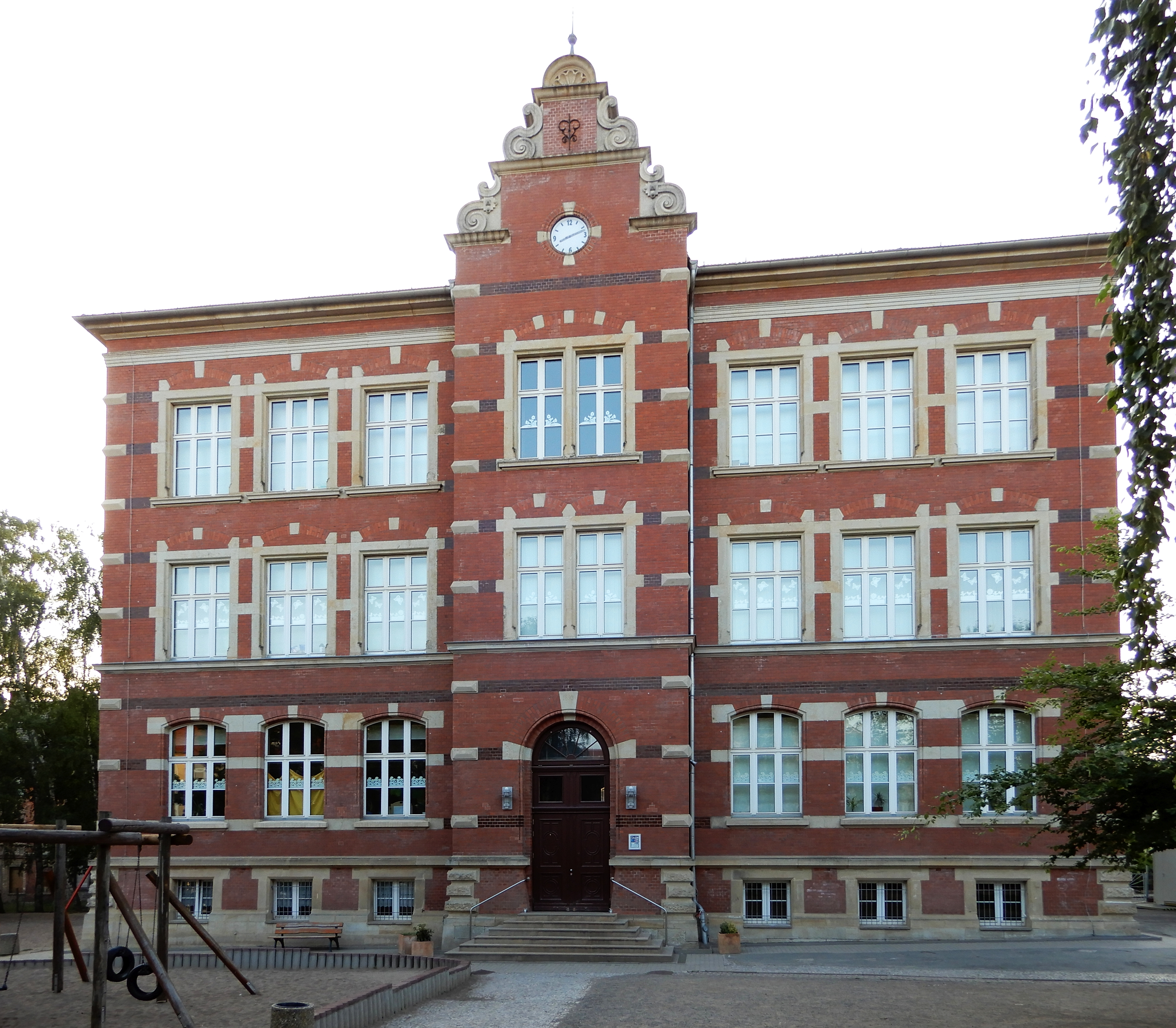 Grundschule Staßfurter Höhe in Aschersleben